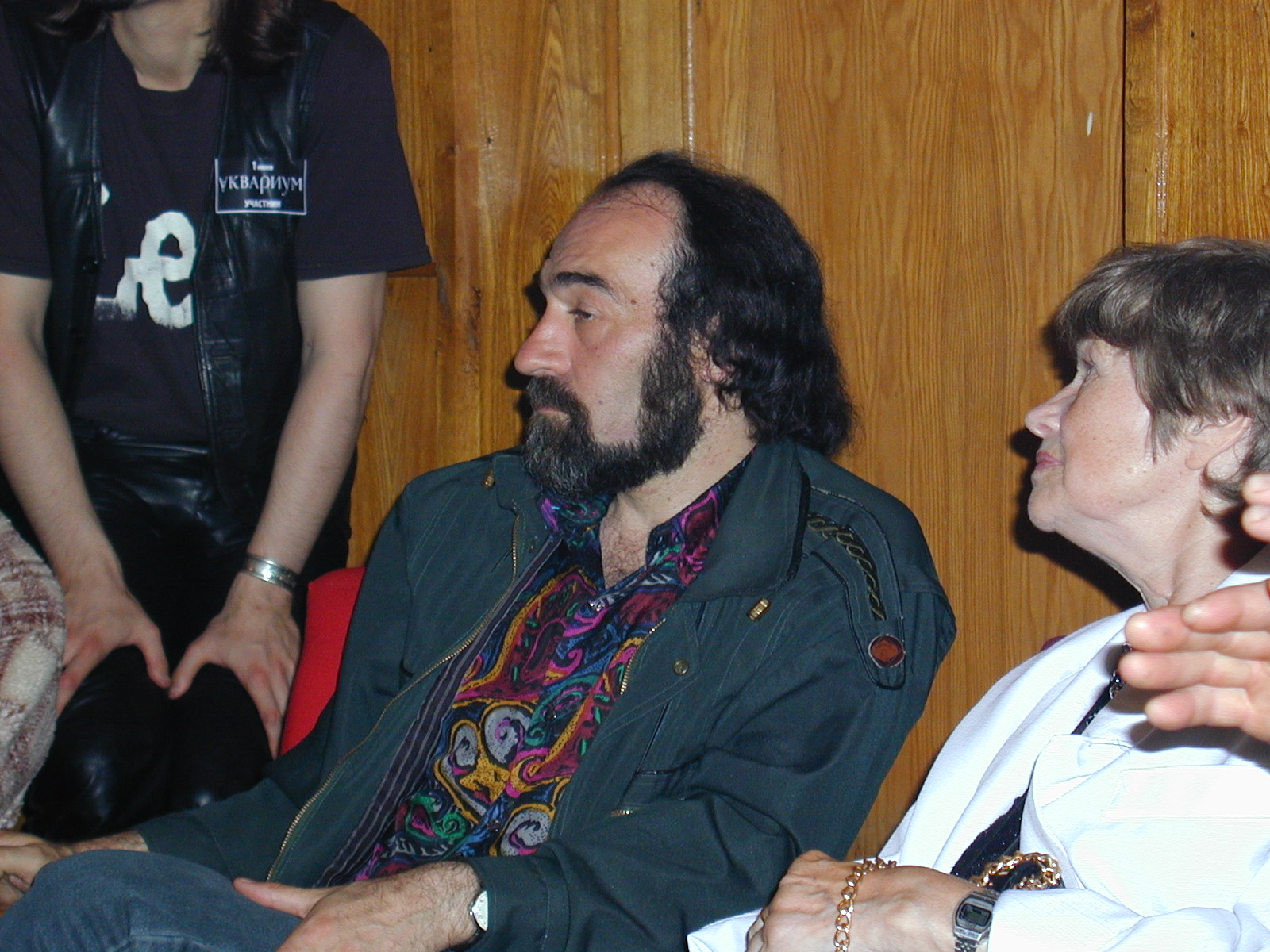 Анатолий «Джордж» Гуницкий (в центре) на импровизированной пресс-конференции после концерта "Аквариума" в ДК "Ленсовета", СПБ, 01.06.2000